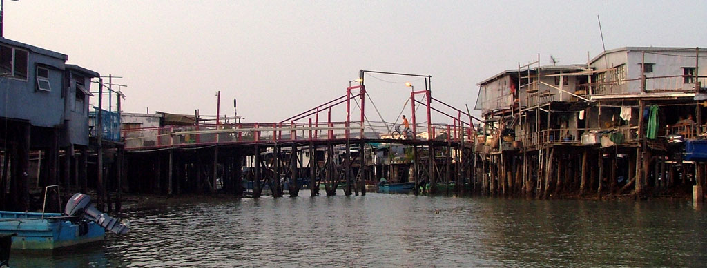 San Ki bridge in Tai O, Lantau Island, Hong Kong Image:Tai O San Ki Bridge.jpg